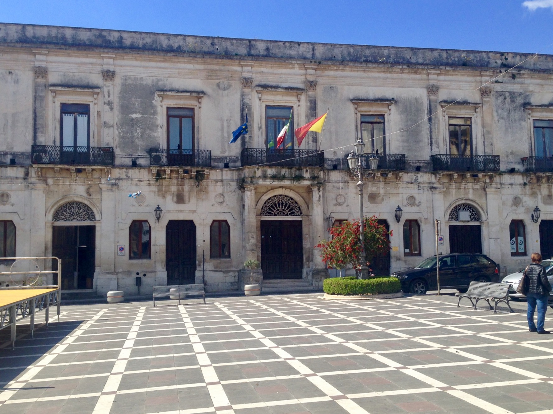 In piazza Umberto I